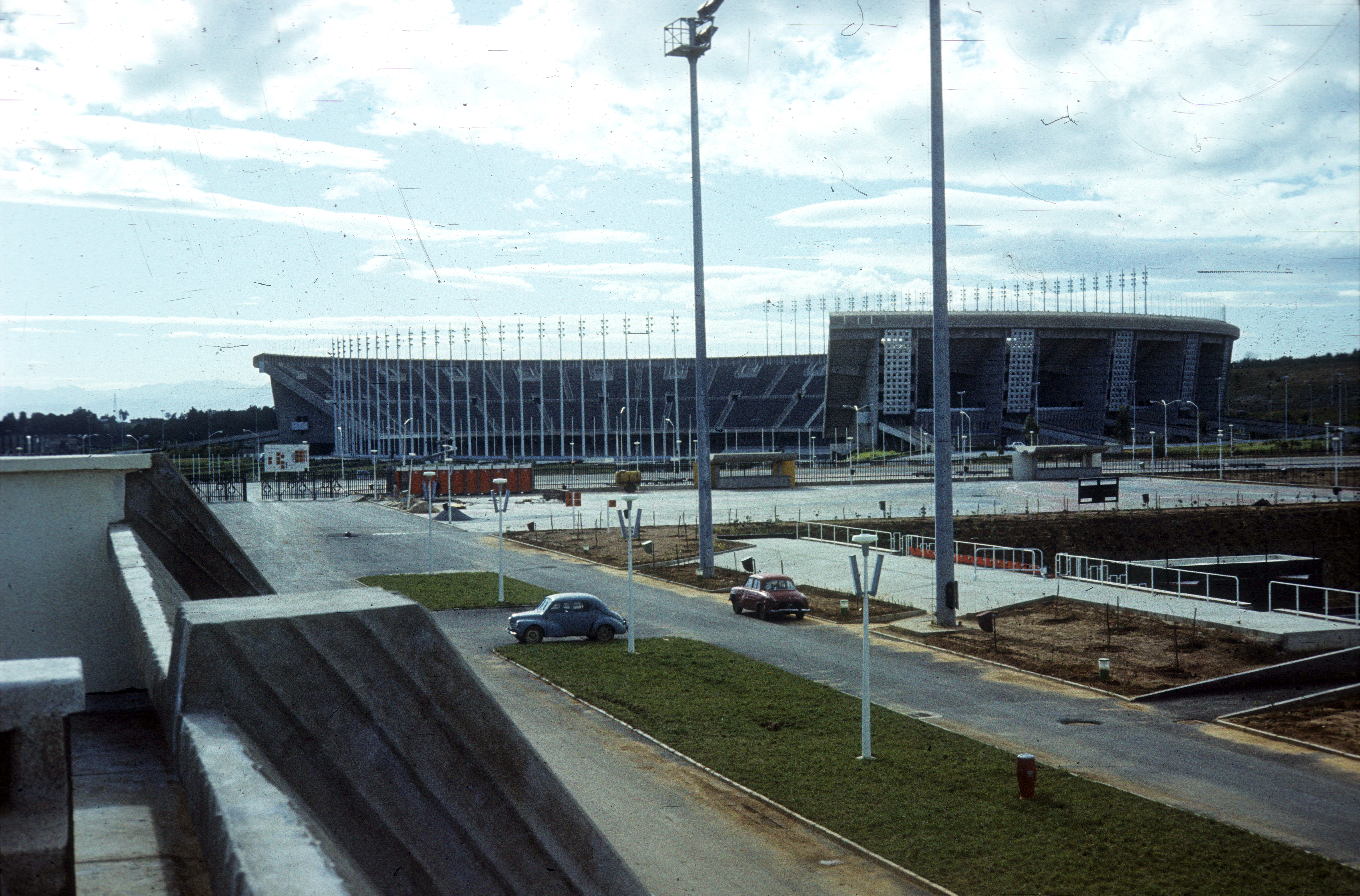 Olimpiai Komplexum, szemben az 1962. július 5.-e Stadion. Location: Algiers, Algiers Tags: colorful Title: Olimpiai Komplexum, szemben az 1962. július 5.-e Stadion.